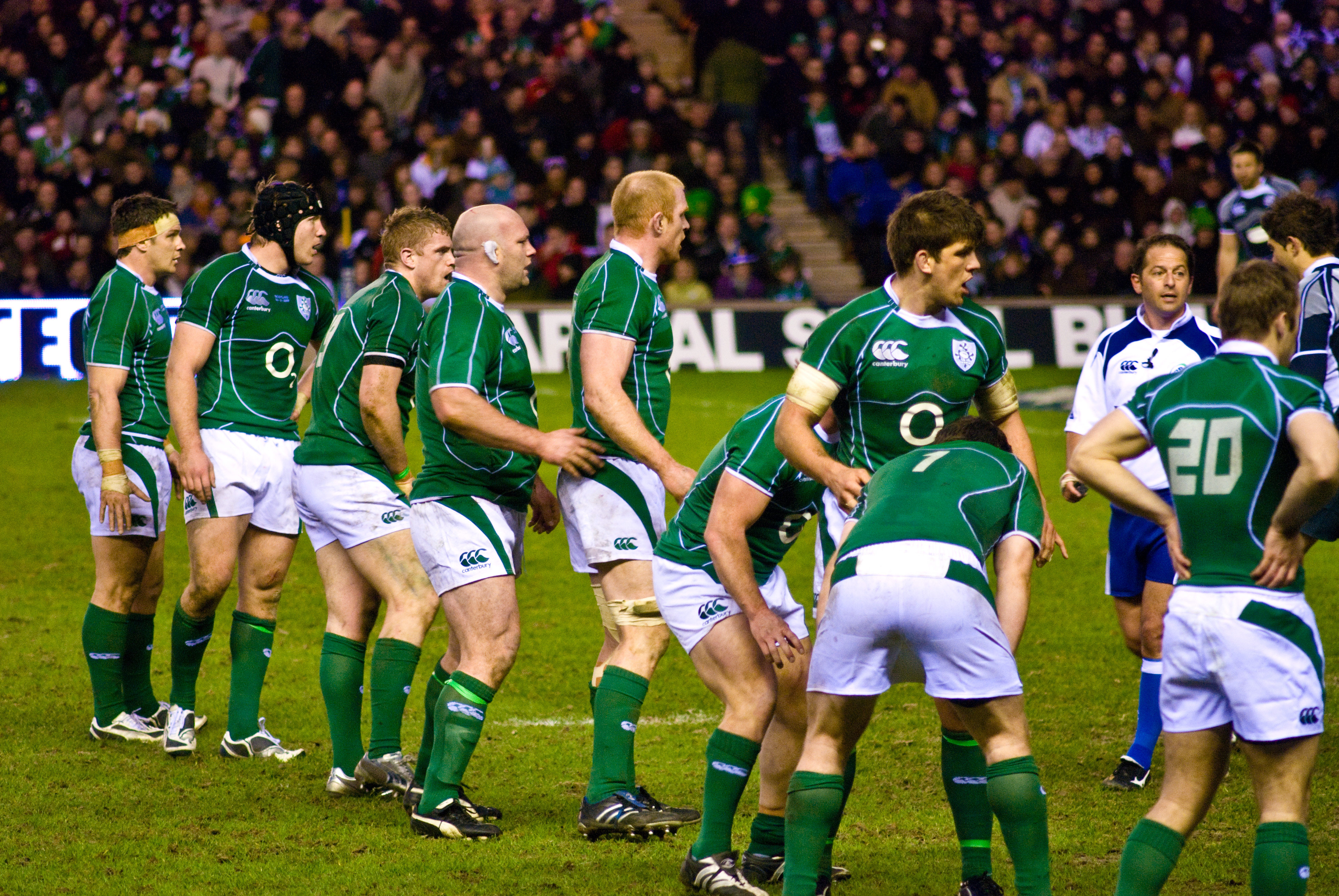 Irlandako errugbi selekzioa 2009ko Sei Nazioen Torneoko partida batean.